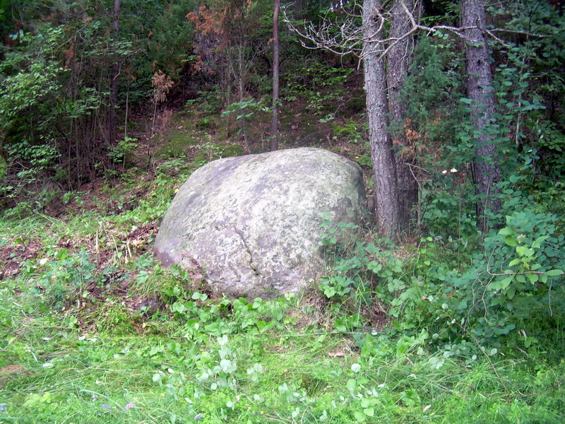 Пільцы. Пільцаўскі валун